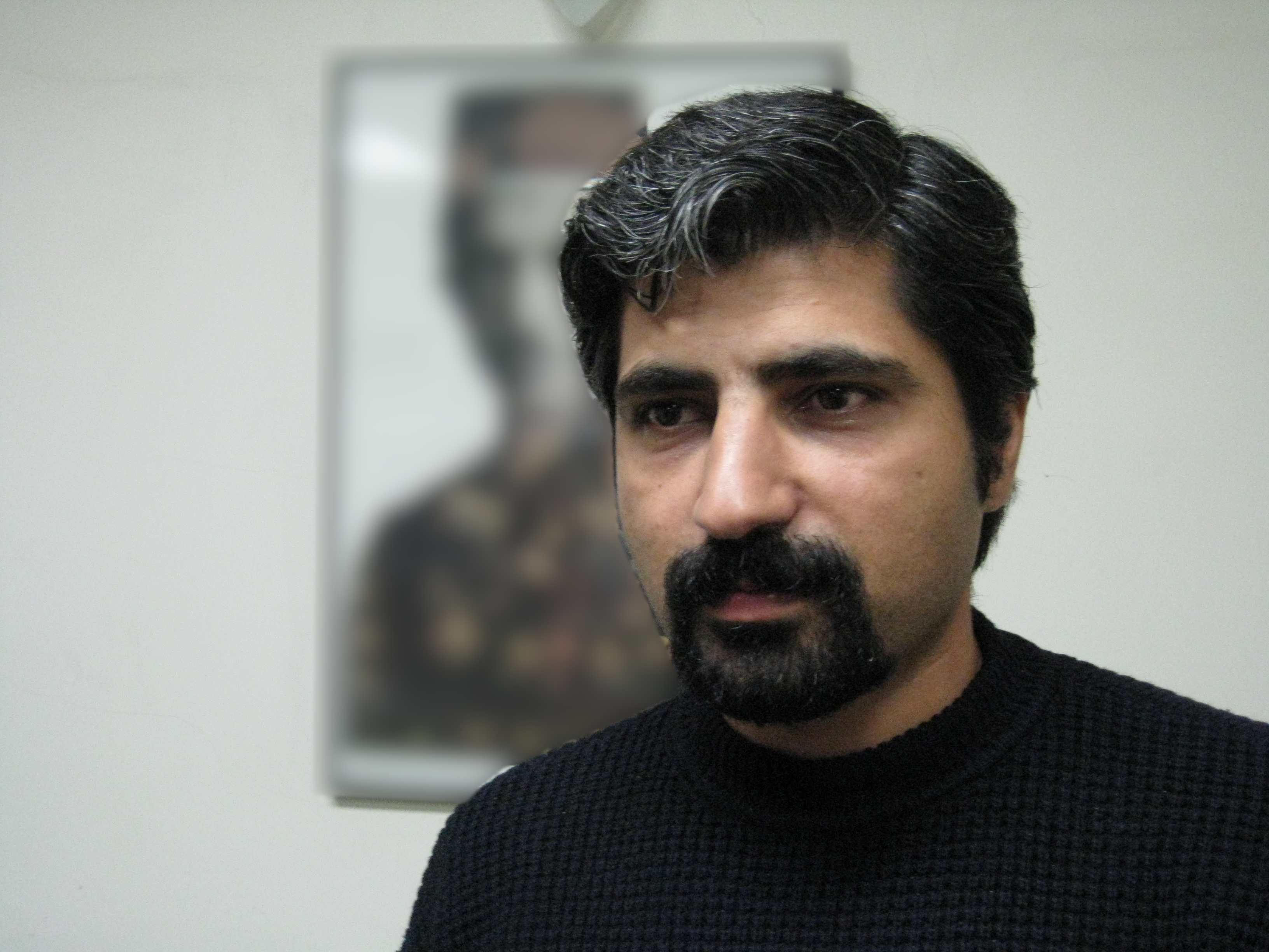 منیرالدین بیروتی.